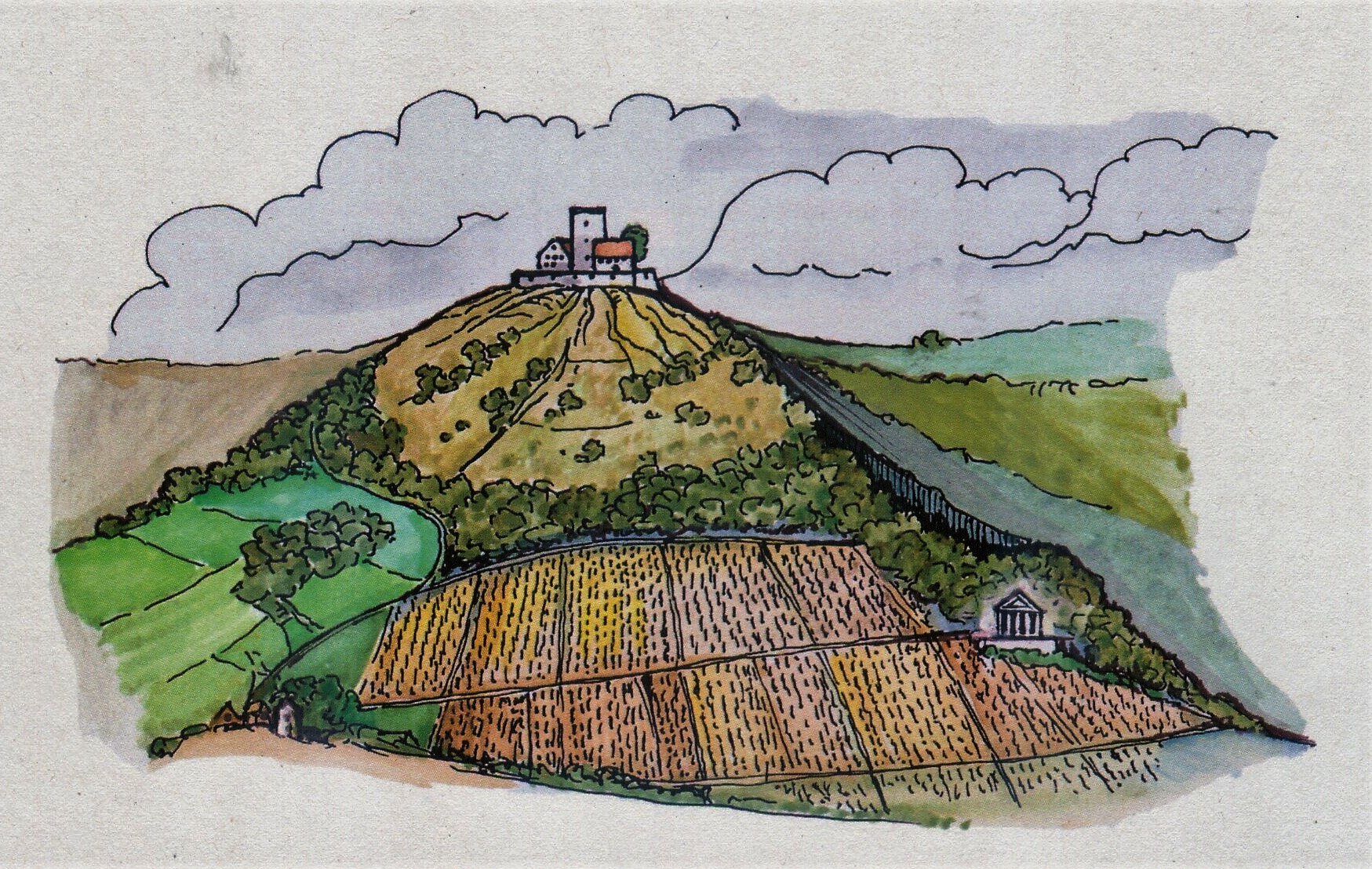 Küssaburg im Landkreis Waldshut in Baden-Württemberg. Historische Darstellung der Burg im Mittelalter. Zeichnung von Wolf Pabst.